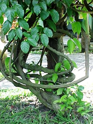 Cipó Mariri